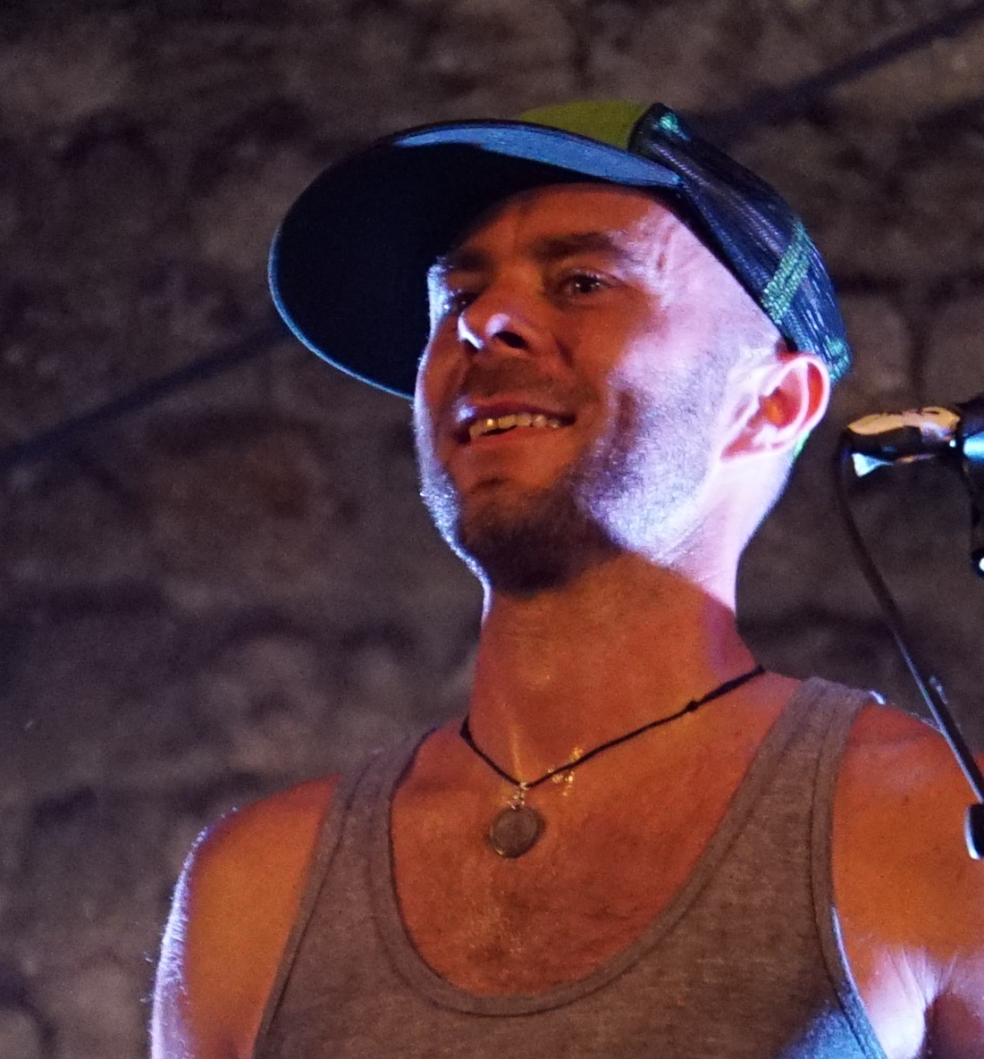 les Youngblood Brass Band à Reims.